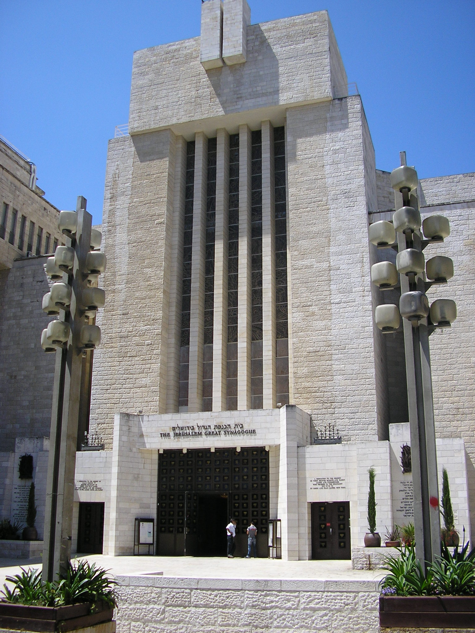 Jerusalem Great Synagogue